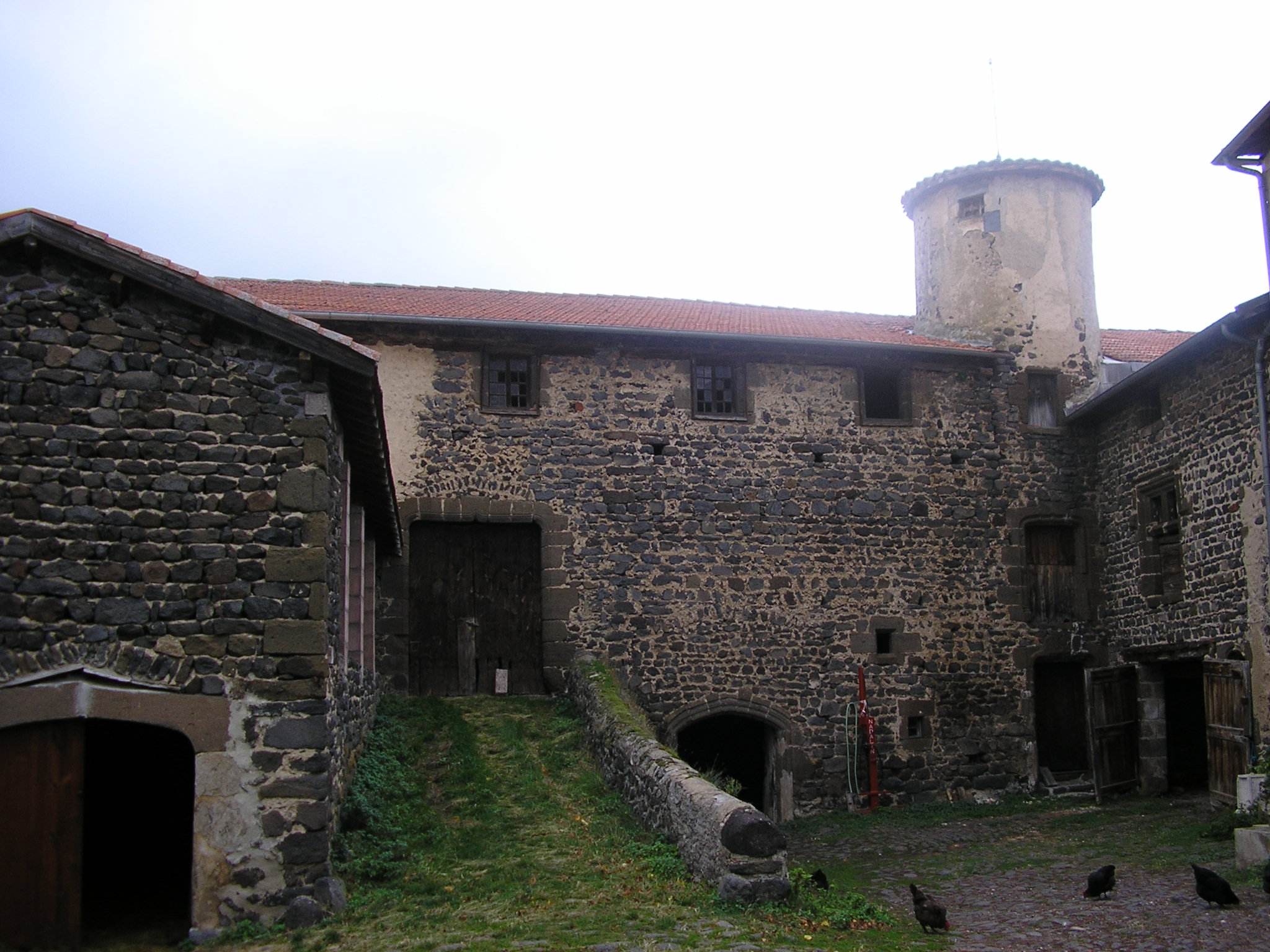 Château de Mestrénac Photographie personnelle de l'utilisateur Clodion.